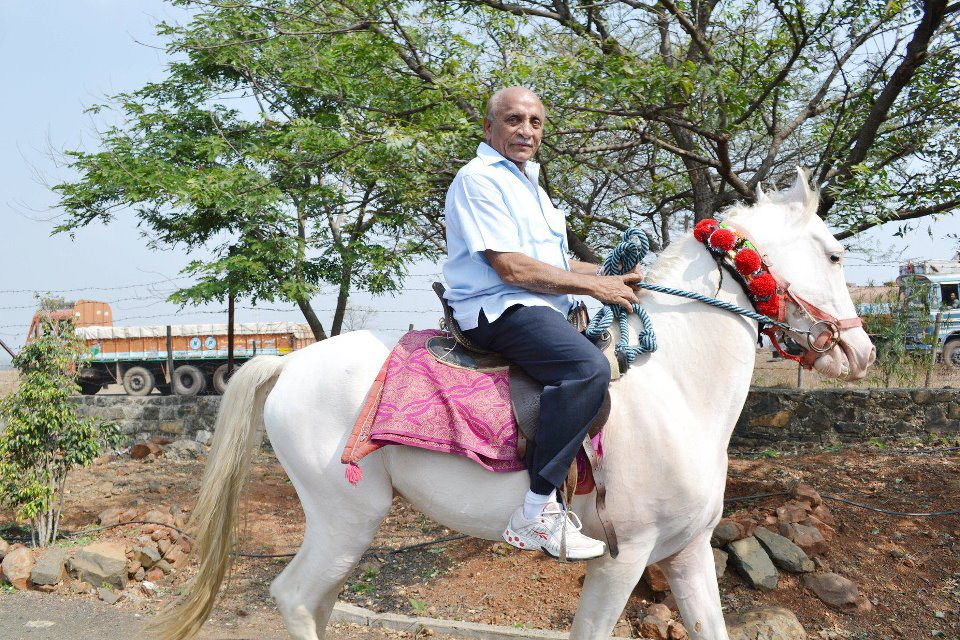 Padamsinh Bajirao Patil (dr. Saheb)